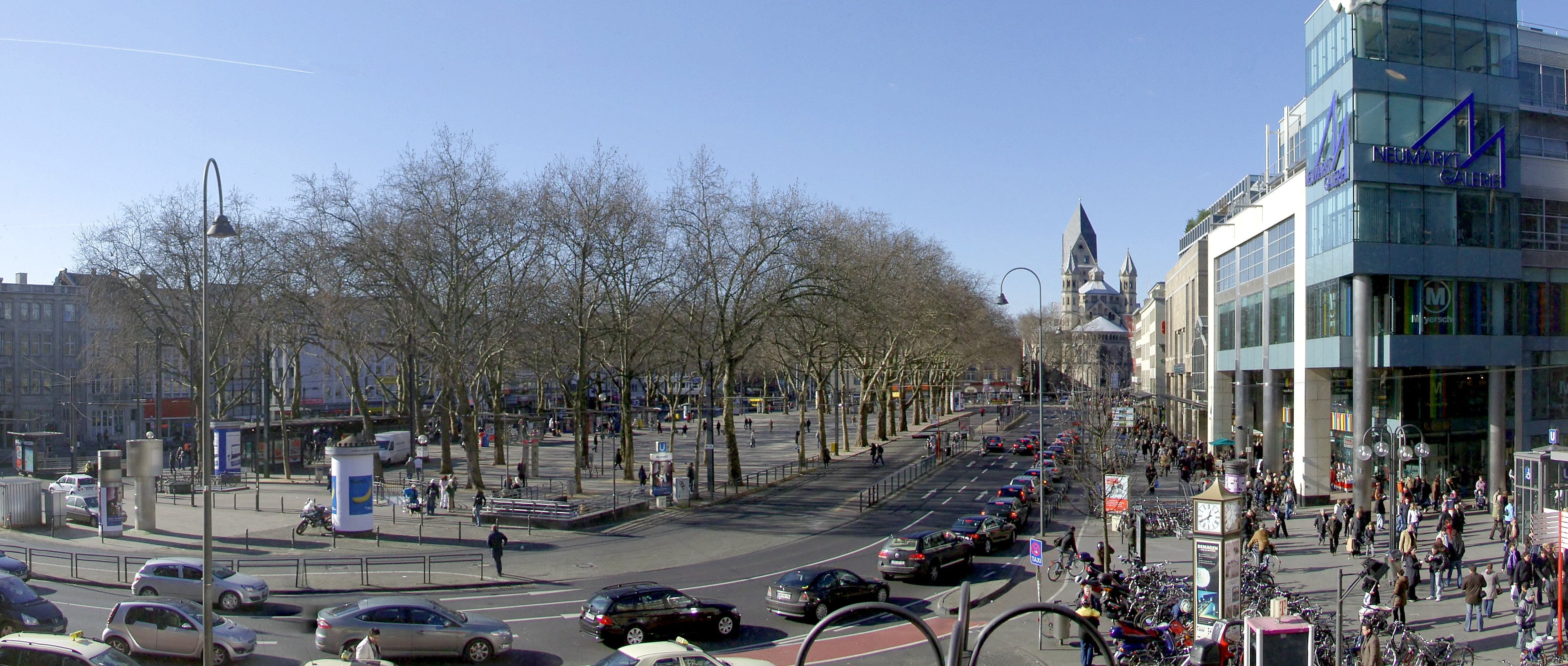 Der Neumarkt in Köln vom Ausgang der Schildergasse gesehen.